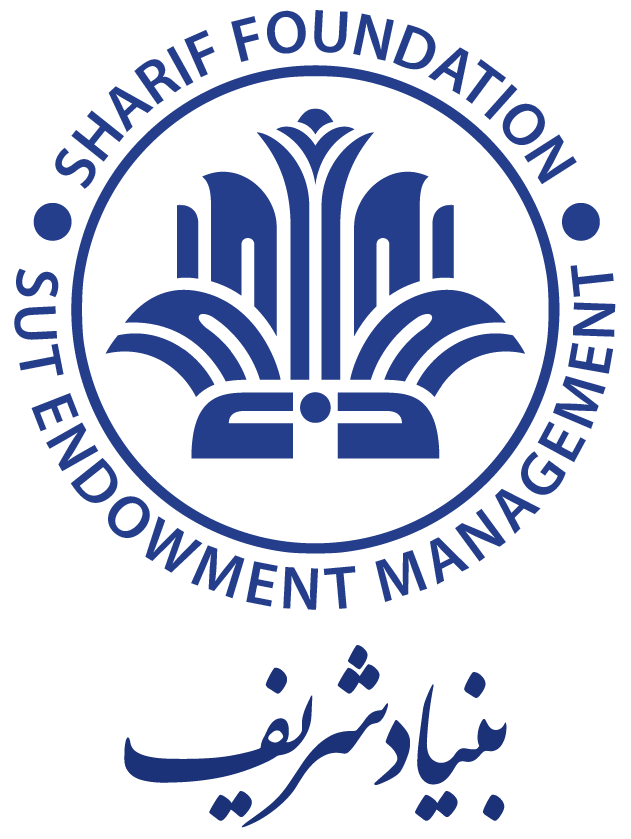 لوگو بنیاد شریف